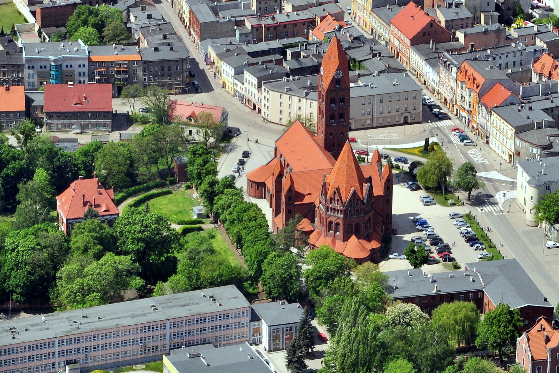 Konkatedra w Ostrowie Wlkp.